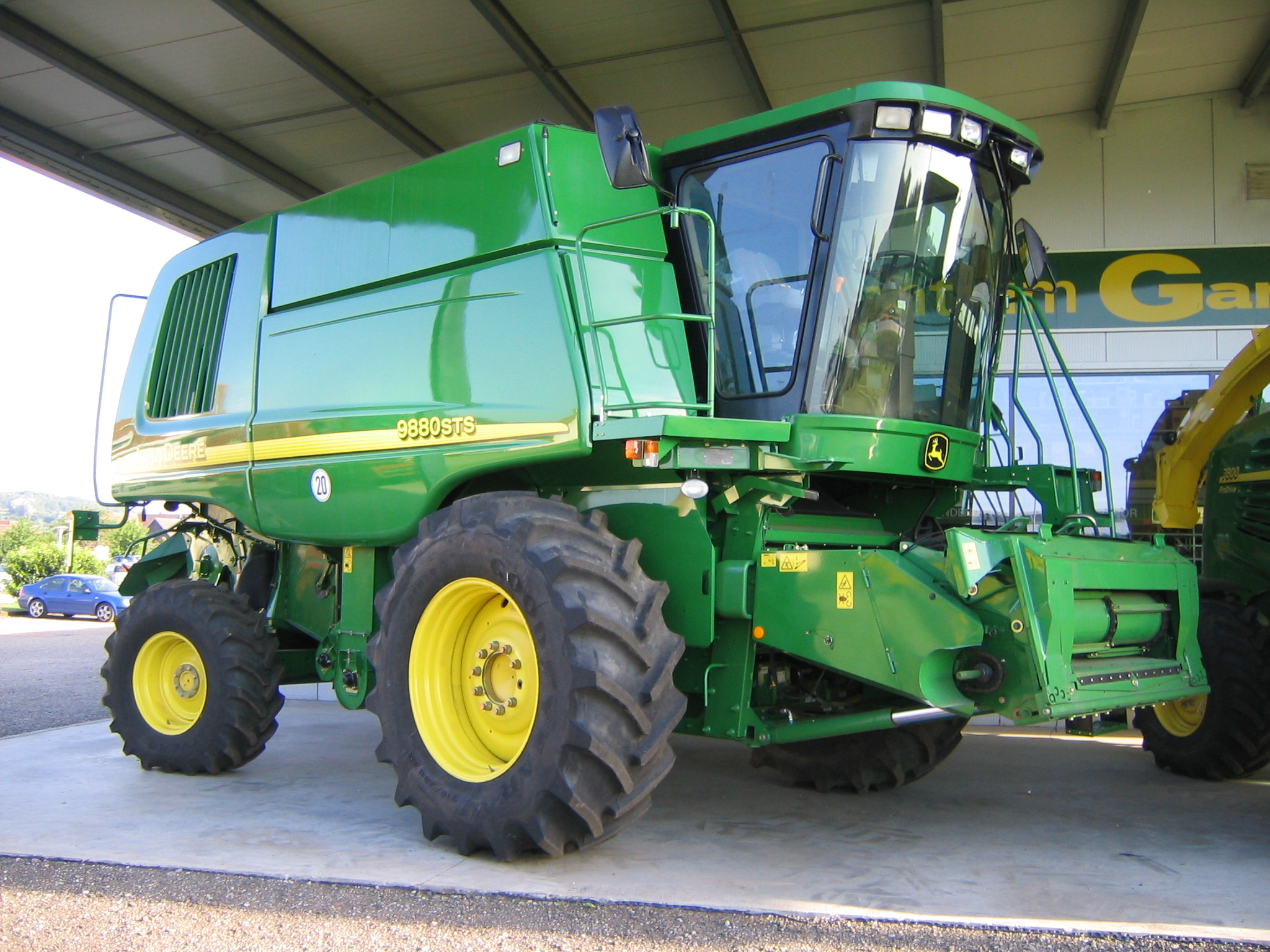 John-Deere-Mähdrescher 9880STS (ohne Schneidwerk), aufgenommen irgendwo zwischen Freiburg und Lahr